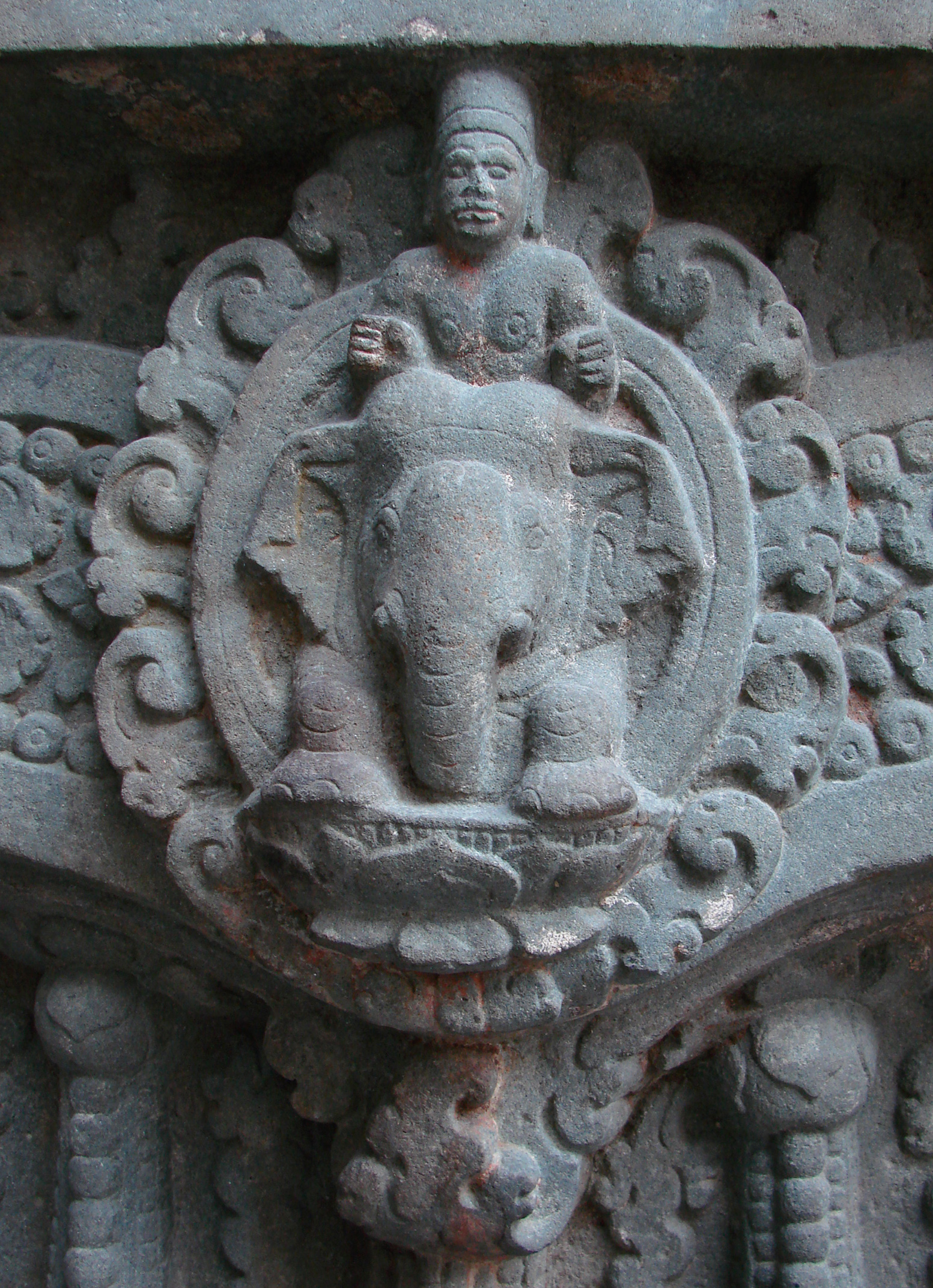 Linteau. Provenance: Cambodge, province de Kompong Thom, Sambor Prei Kuk S7. Style de Sambor Prei Kuk. 1ère moitié du 7ème siècle.Détail:Indra, dieu de l'orage et gardien de l'Est, chevauchant l'éléphant Airavana. Musée Guimet, Paris.